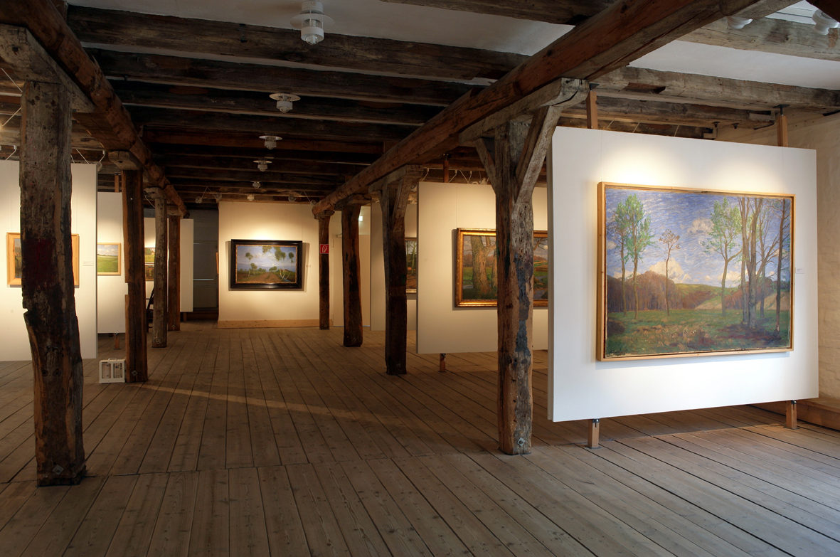 Großer Ausstellungssaal